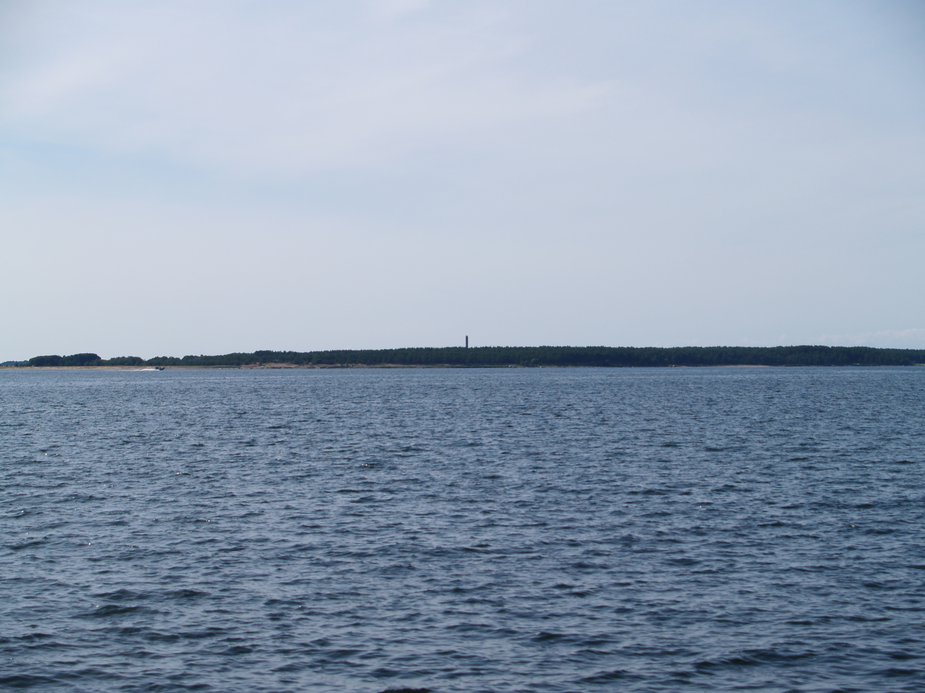 Pildistatud Aksi saarelt. Üle mere paistab Prangli.